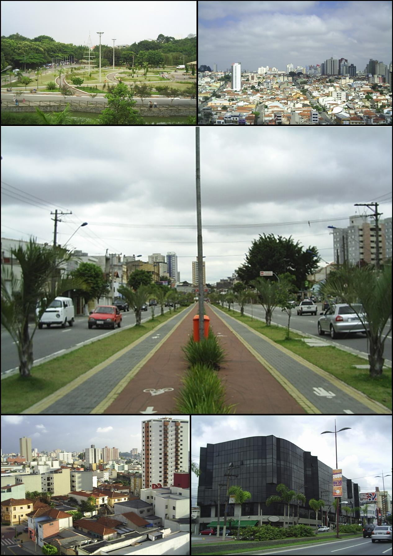 Fotos de São Caetano do Sul, SP, Brasil.